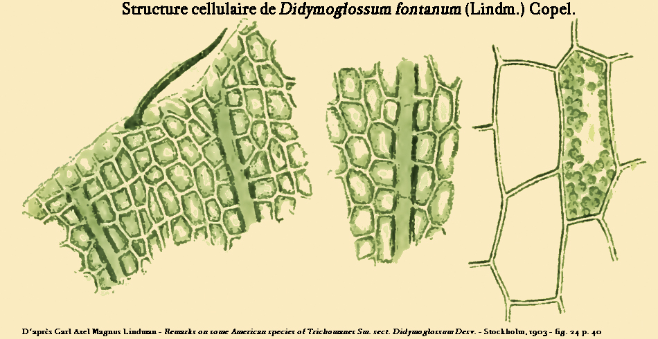 Détail des cellules de Didymoglossum fontanum. Planche de Carl Axel Magnus Lindman (figure 24 p. 40 de Remarks on some American species of Trichomanes Sm. sect. Didymoglossum Desv.